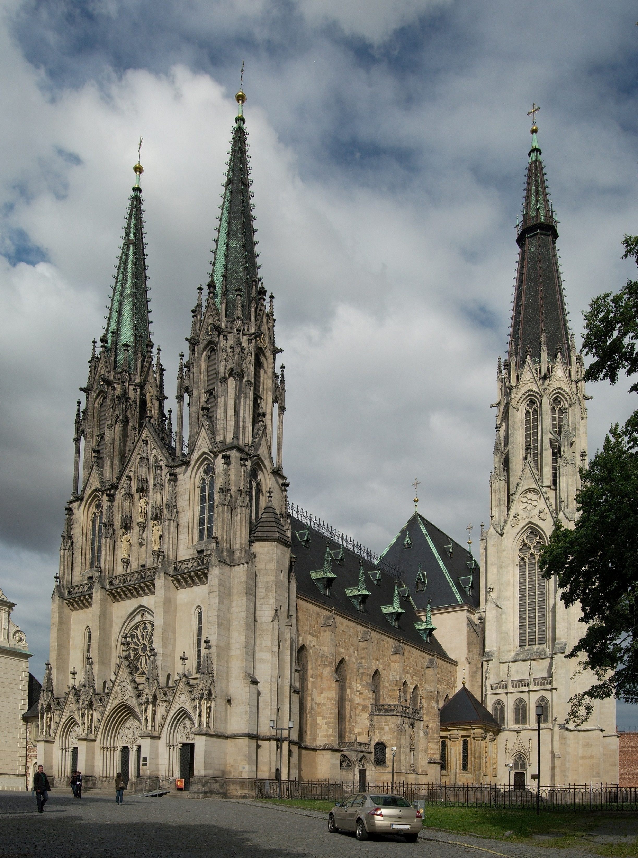 Olomoucká katedrála sv. Václava, vyfotografovaná od jihozápadu